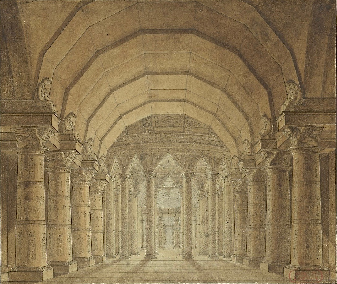 Charles Percier (1764–1838): Skizze eines Bühnenbilds zur 1787 uraufgeführten Oper "Tarare" von Pierre-Augustin Caron de Beaumarchais (Libretto) und Antonio Salieri (Musik). Bibliothèque nationale de France.